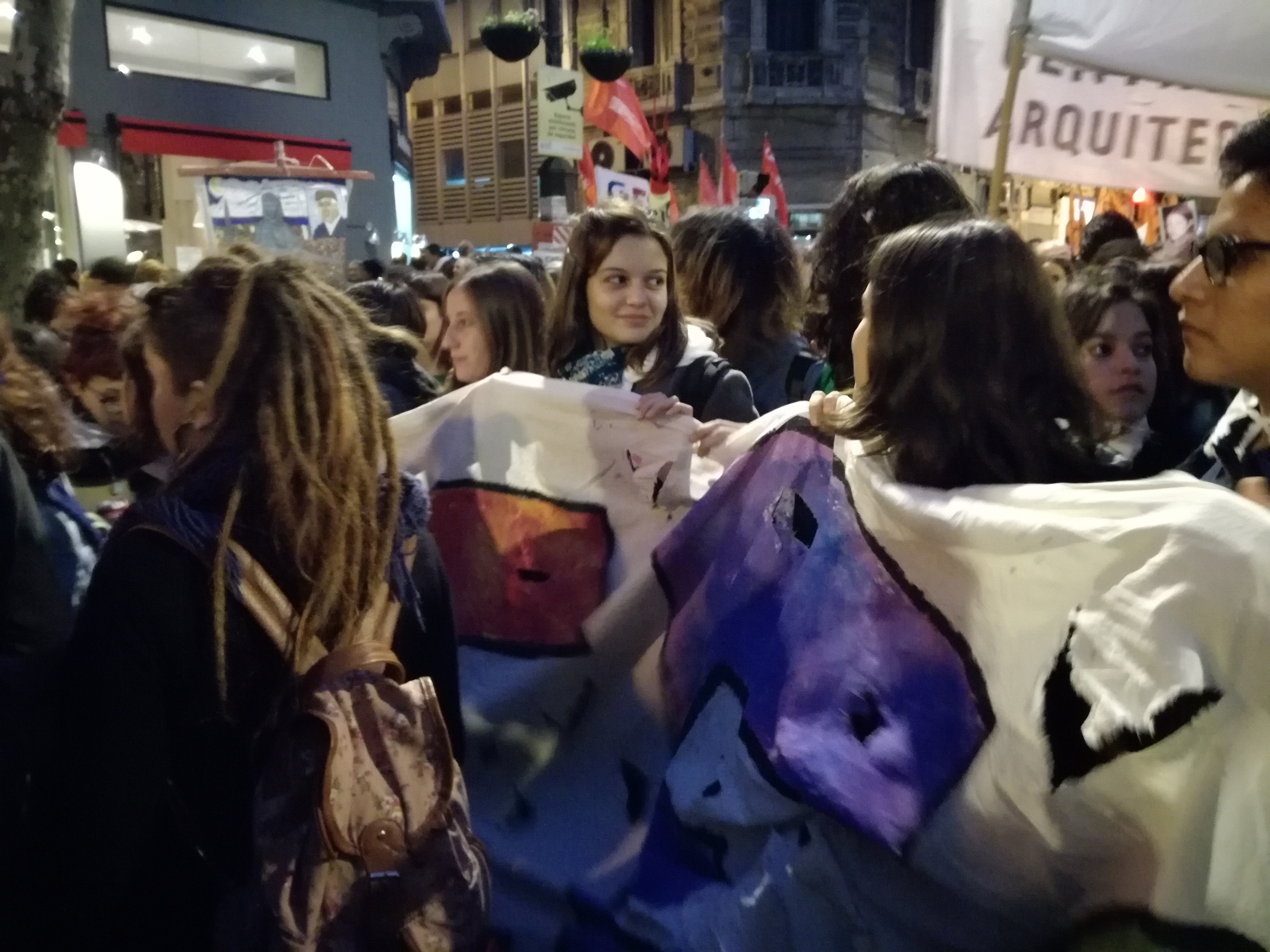 Buenos Aires, Argentina. Derechos humanos. Marcha contra el fallo de la Corte aplicando la reducción de pena del 2x1 a los crímenes de lesa humanidad.